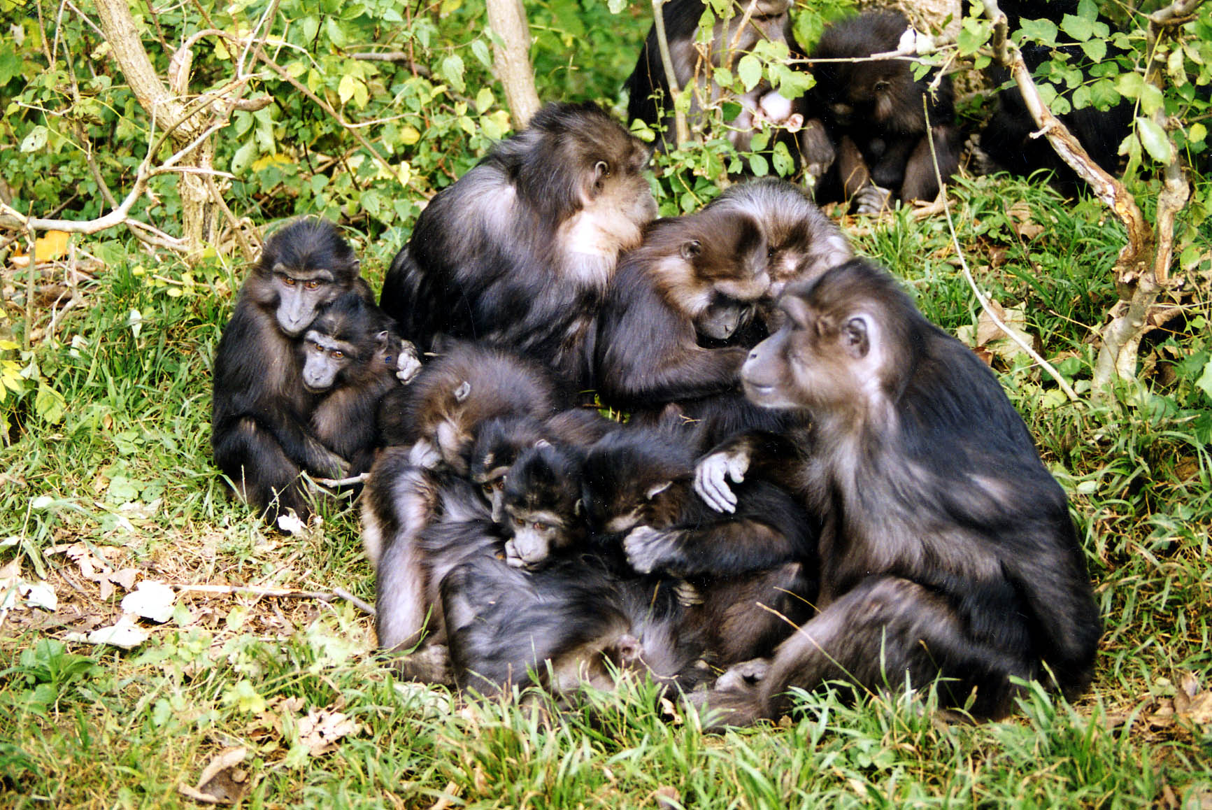 Un groupe de macaques de Tonkean. Photographie de Christophe Chauvin.